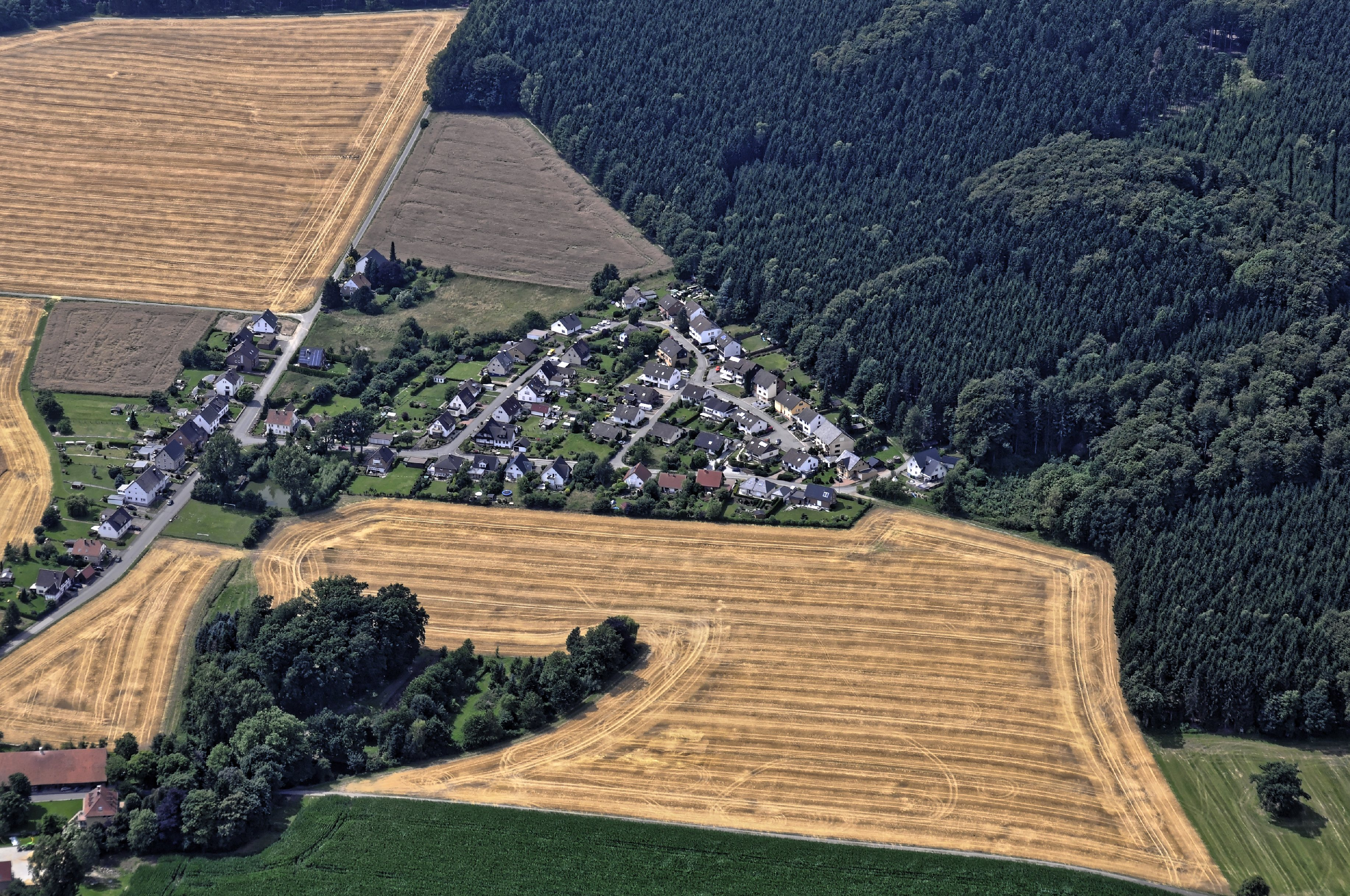 Bilder vom Flug Nordholz-Hammelburg 2015: Sommersell (Barntrup)